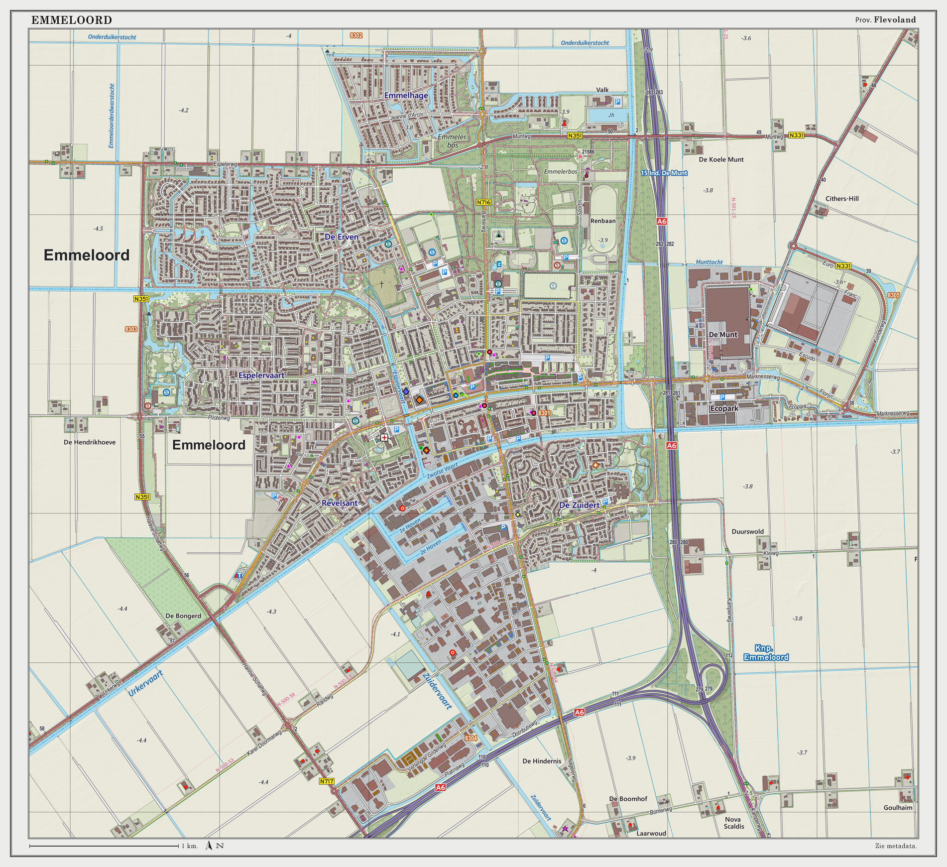 Topografische kaart van Emmeloord (woonplaats). Resolutie: 300 pixels/km. Kaartbeeld samengesteld uit de open geodata van de Top10NL en Top25namen (Basisregistratie Topografie), Creative Commons BY licentie. Gebouwvlakken uit open geodata BAG extract. Wegen uit de OpenStreetMap, OpenStreetMap community. Schaduwreliëf uit de Actuele Hoogtekaart AHN2. Samenstelling en kleurenschema: Jan-Willem van Aalst, met QGIS2. Zie ook de Legenda.